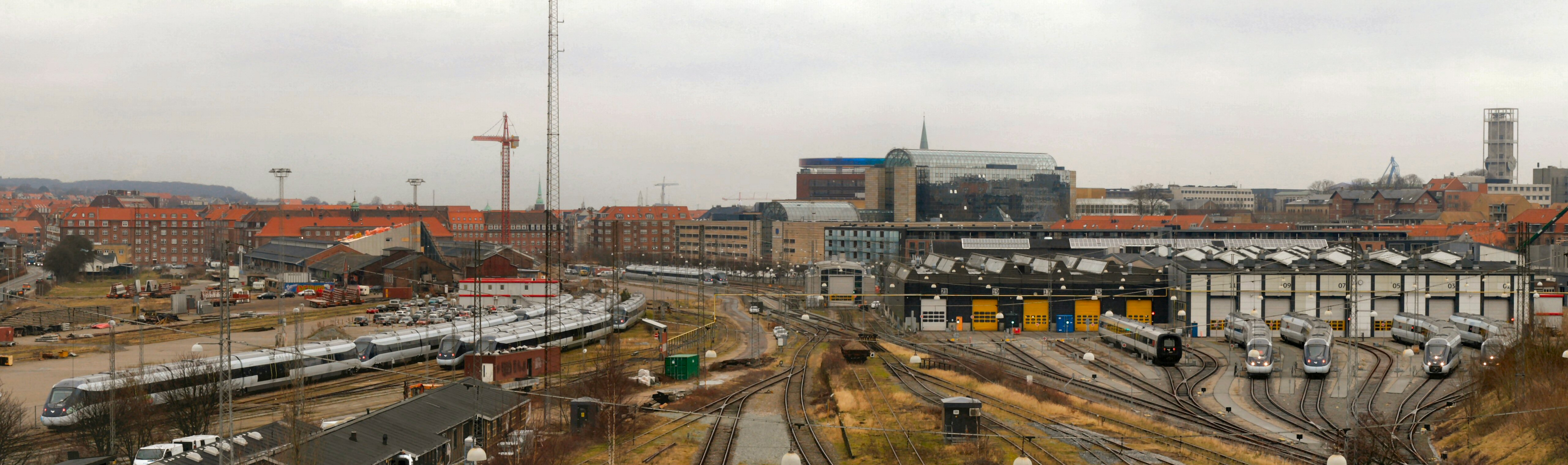 IC4 tog venter på reparation i Aarhus